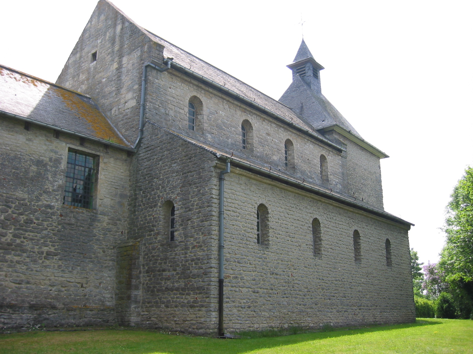 De Sint-Veronakapel/Heilige-Kruiskapel in Verona, een 'gehucht' in Leefdaal. (Gemaakt in juni 2006)